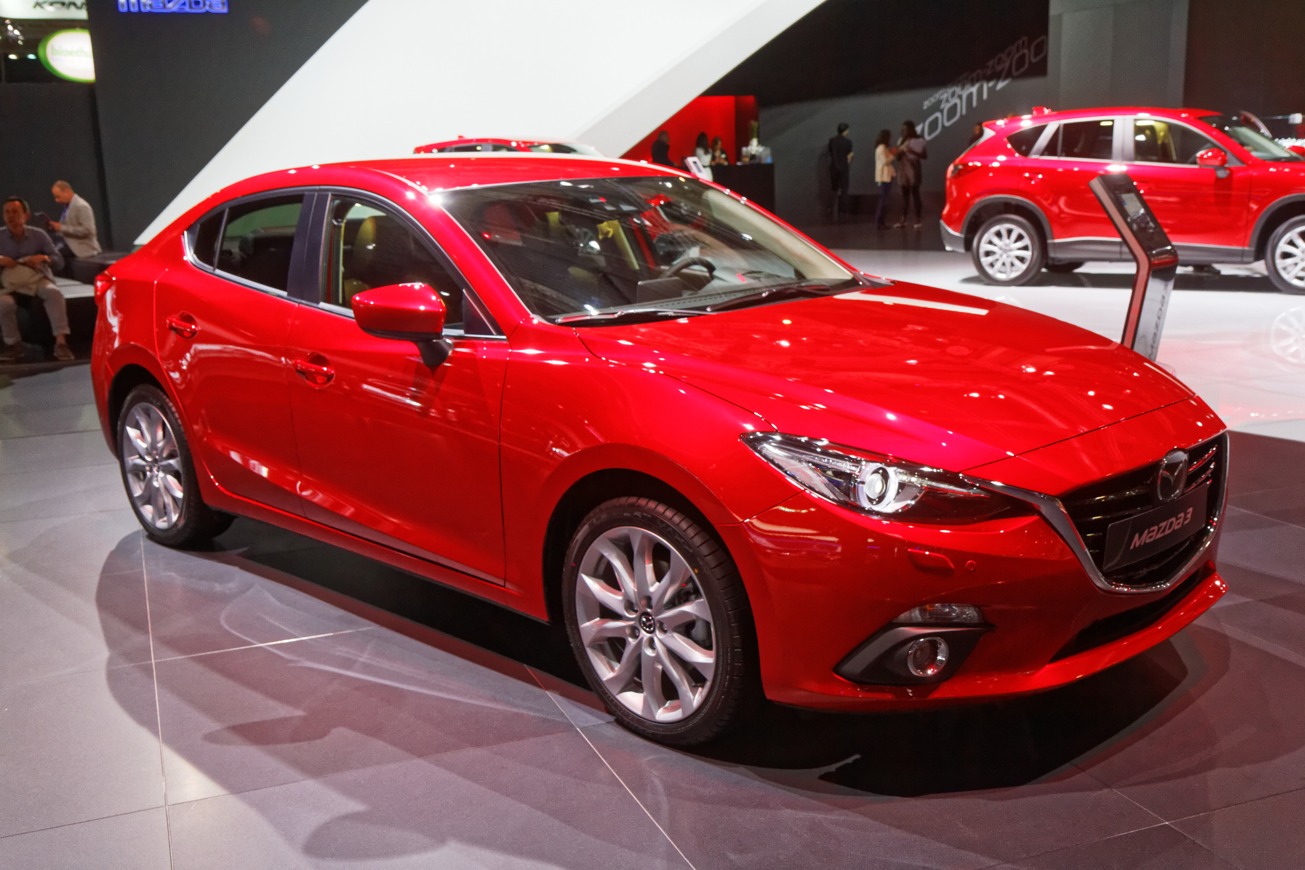 Une Mazda 3 présentée lors du mondial de l'automobile de Paris 2014.